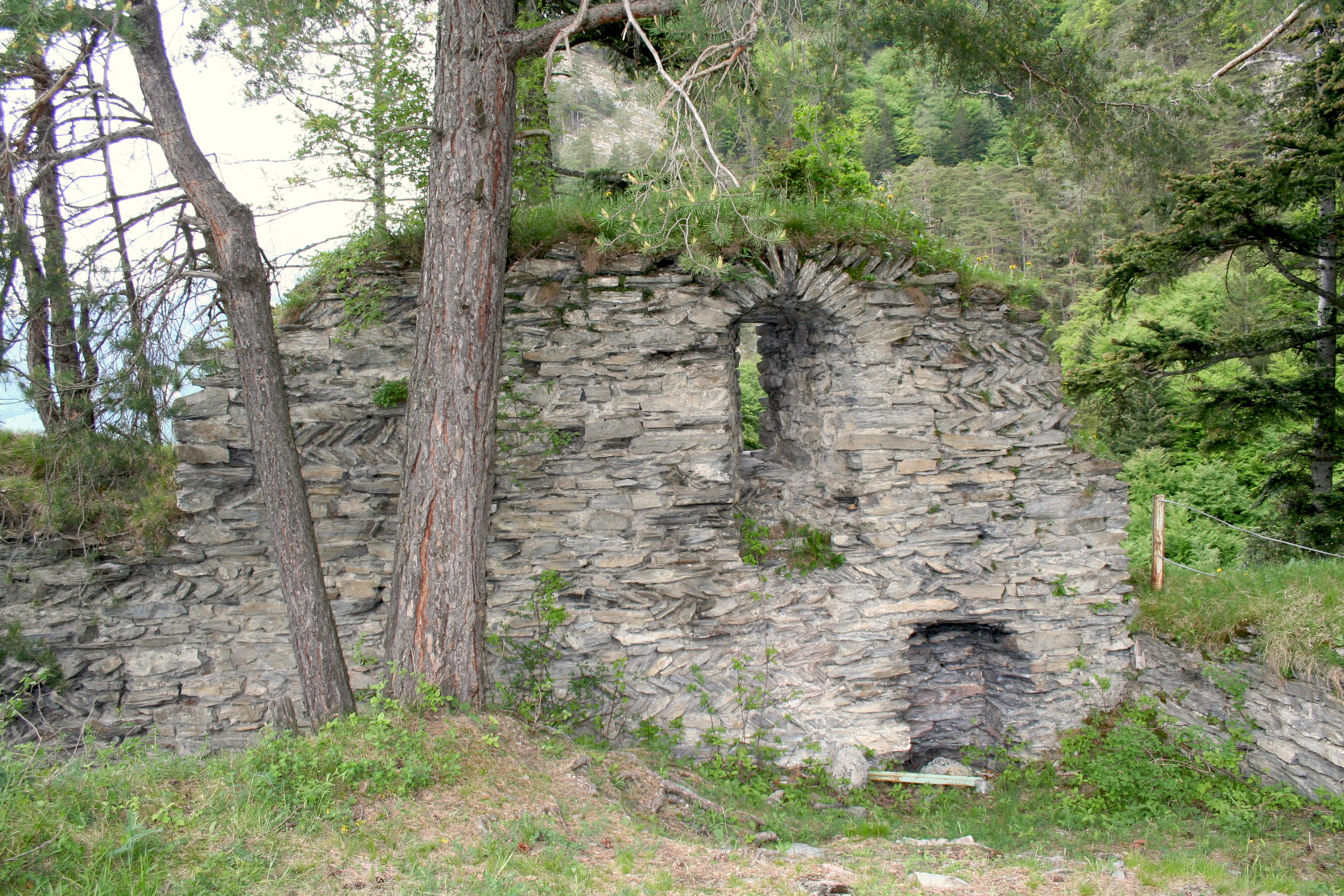 innere Nordwand mit Fenster und Ausgussnische